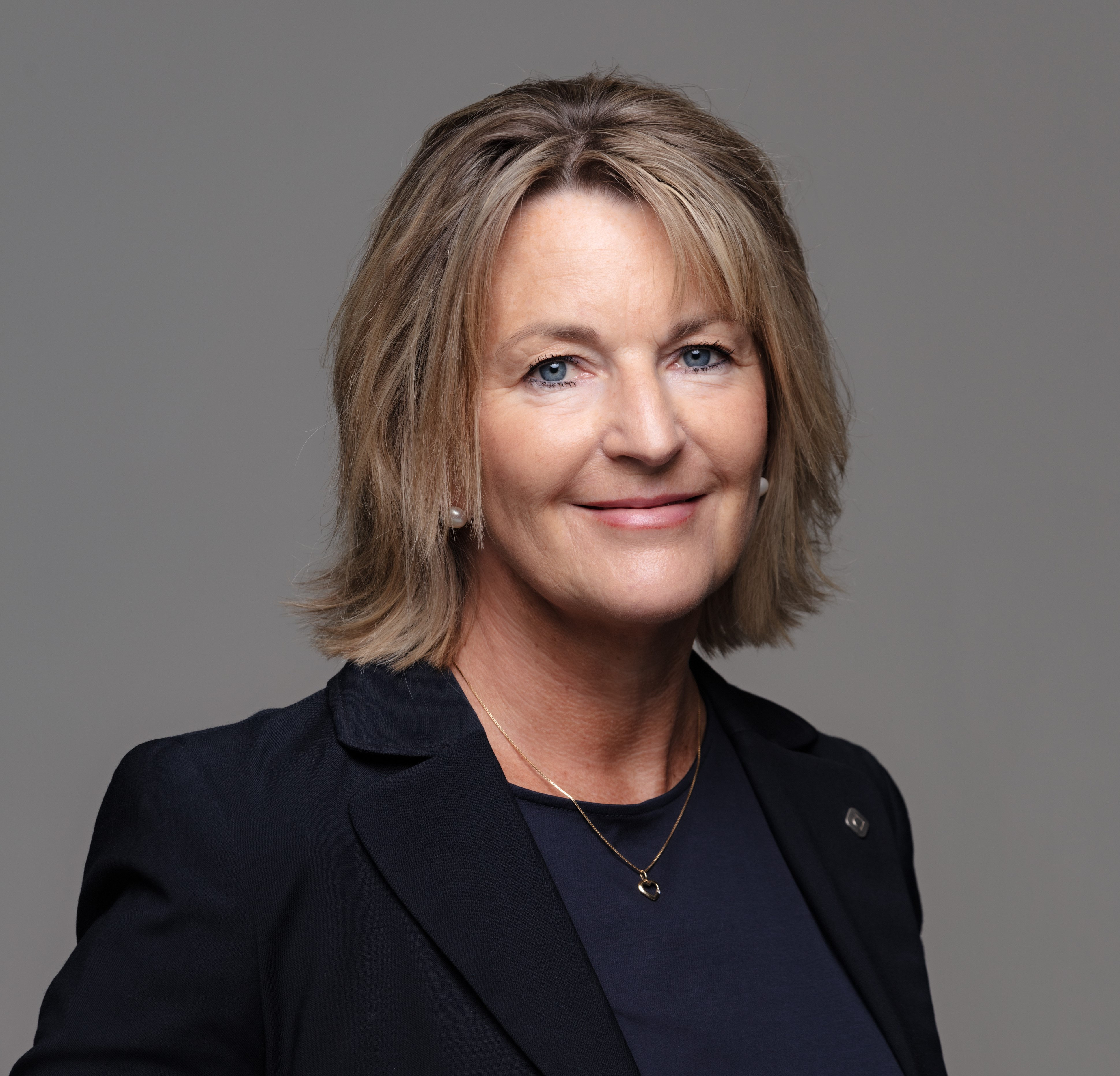 Ingrid Schjølberg, norsk professor i marin kybernetikk ved NTNU dekan ved Fakultet for informasjonsteknologi og elektroteknikk (IE) samme sted